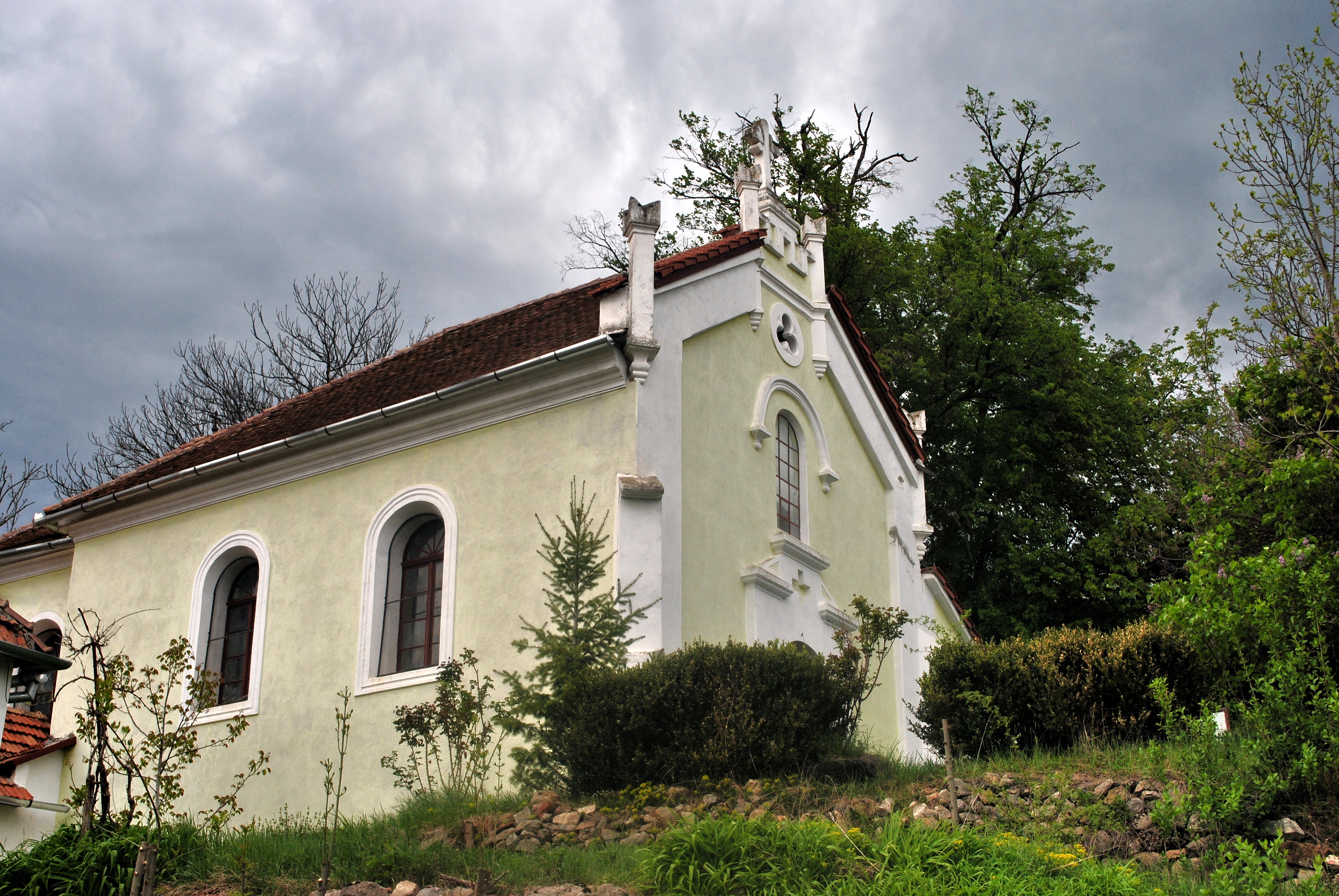 Biserica romano-catolică 01